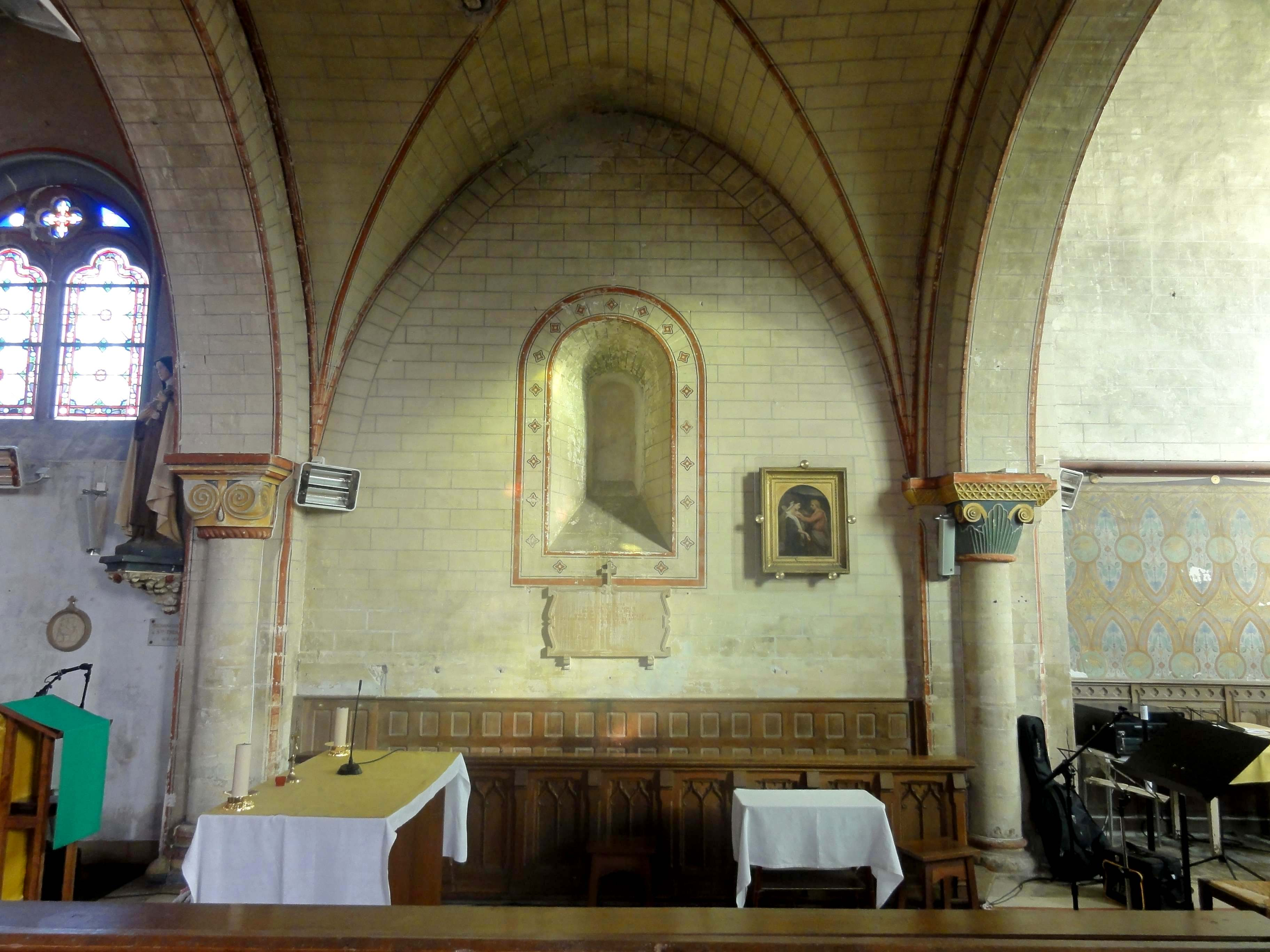 Base du clocher, vue vers le nord.